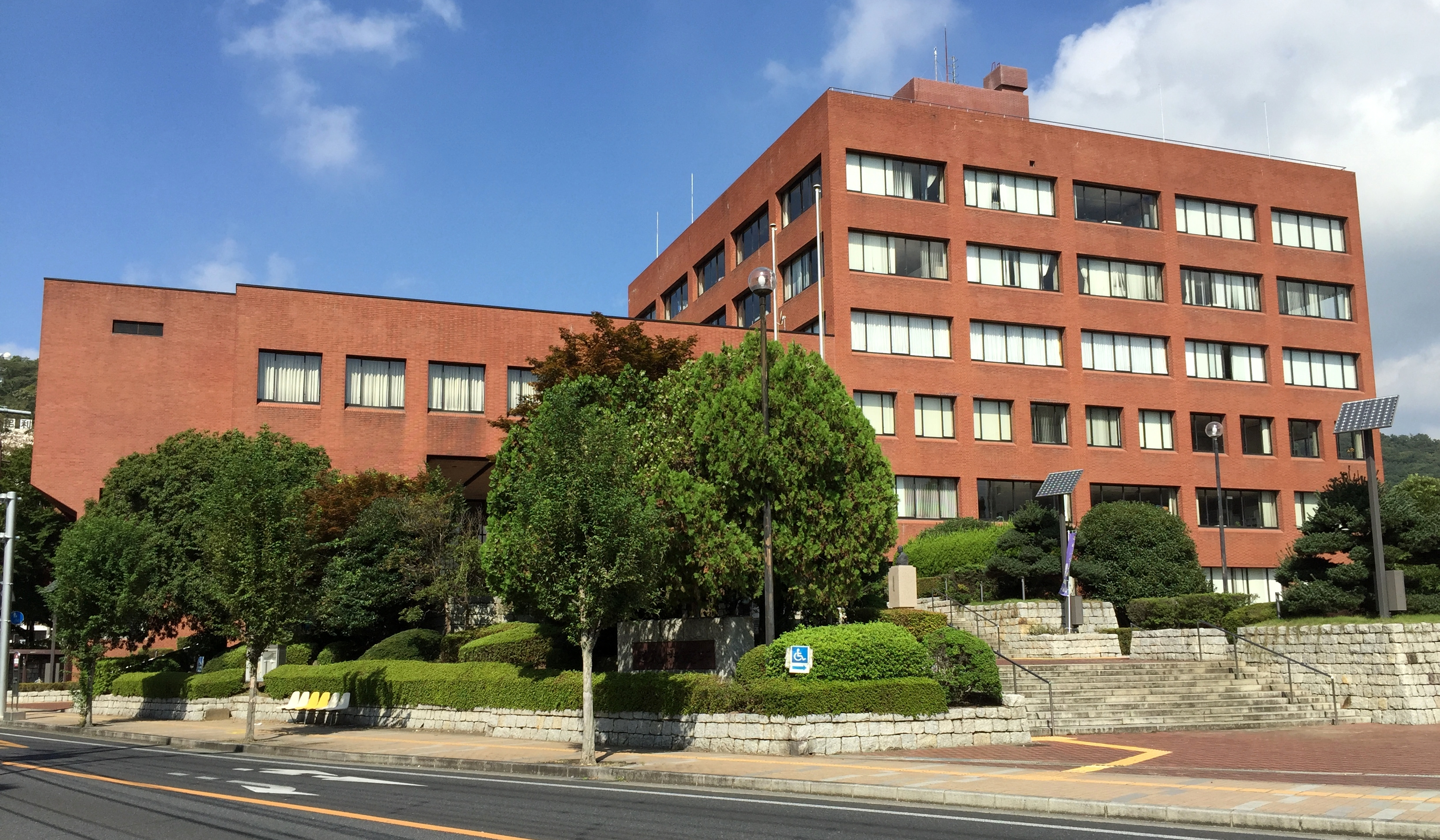 足利市役所